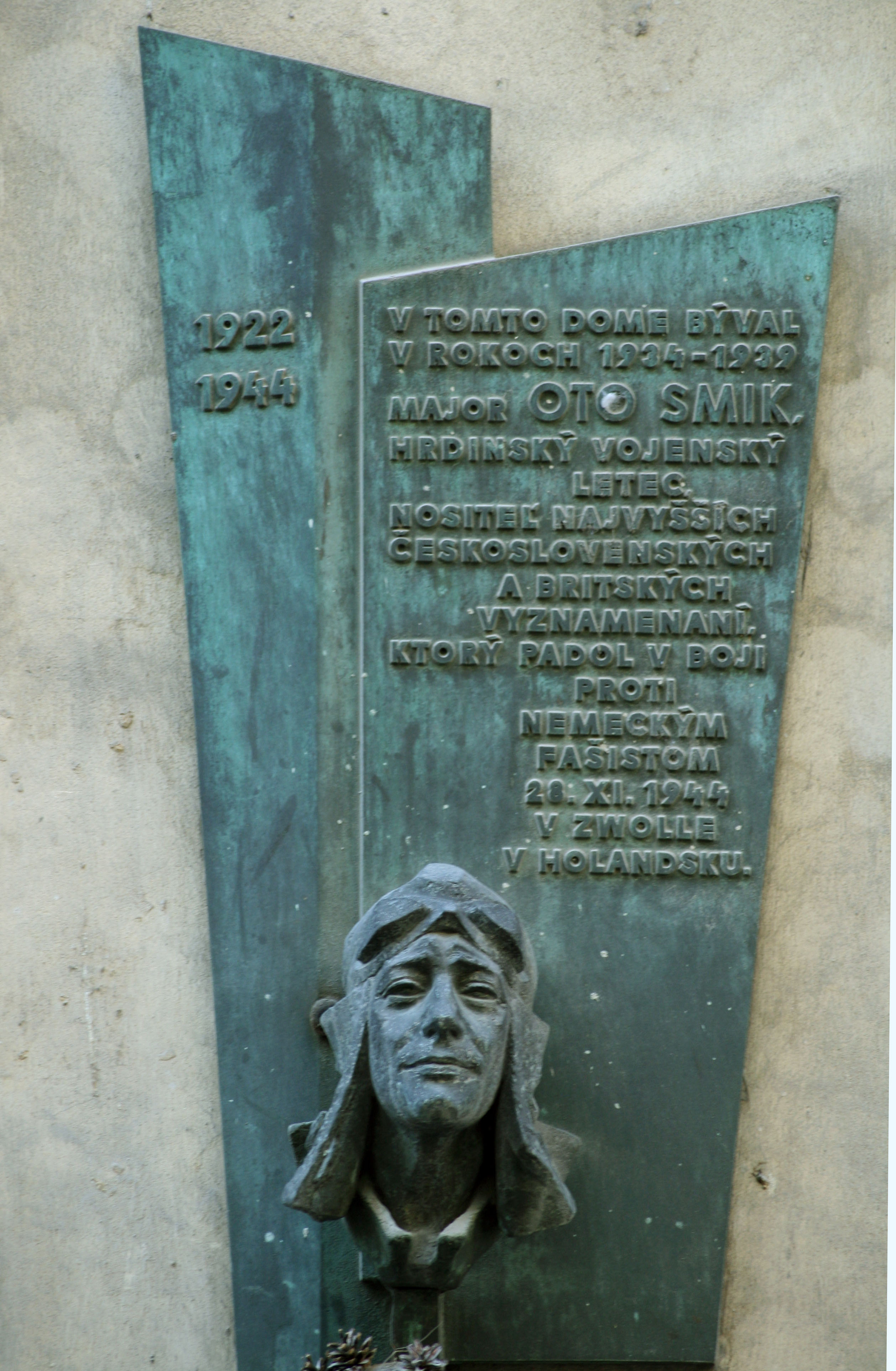 Informačná tabuľa o Ottovi Smikovi príslušníkovi západného zahraničného vojenského odboja v druhej svetovej vojne z roku 1970.